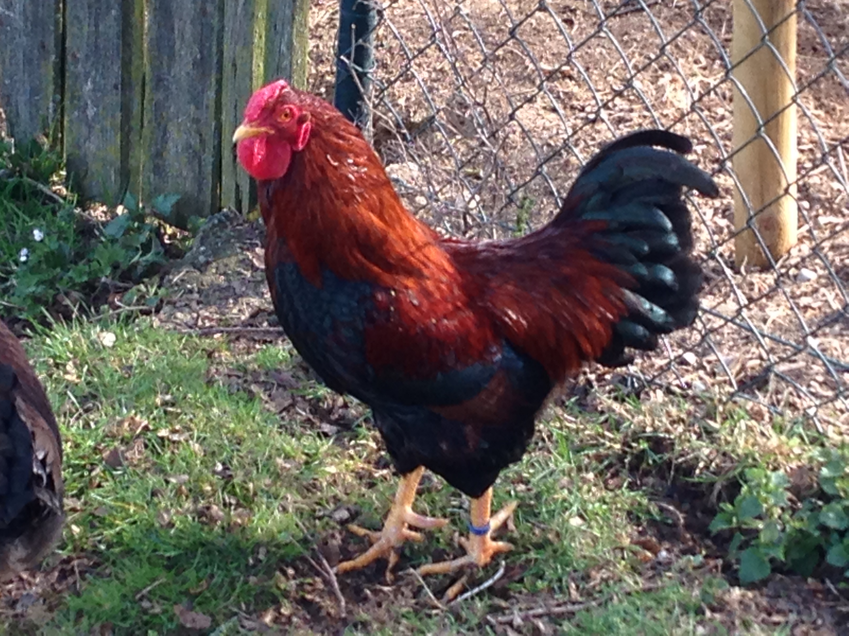 Zwerg-Dresdner (Hahn), Zuchtanlage Kleintierzuchtverein Bargau, Halter: Frank Giesin; Der Hahn errang bei der Bundesschau des BDRG und des VZV in Ulm 2012, das Zwerghuhnband und die Bewertung hv 96